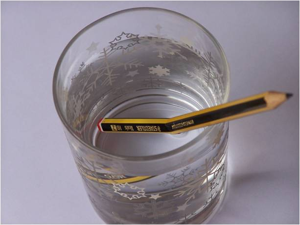 Refracción de un lápiz en un vaso de agua.